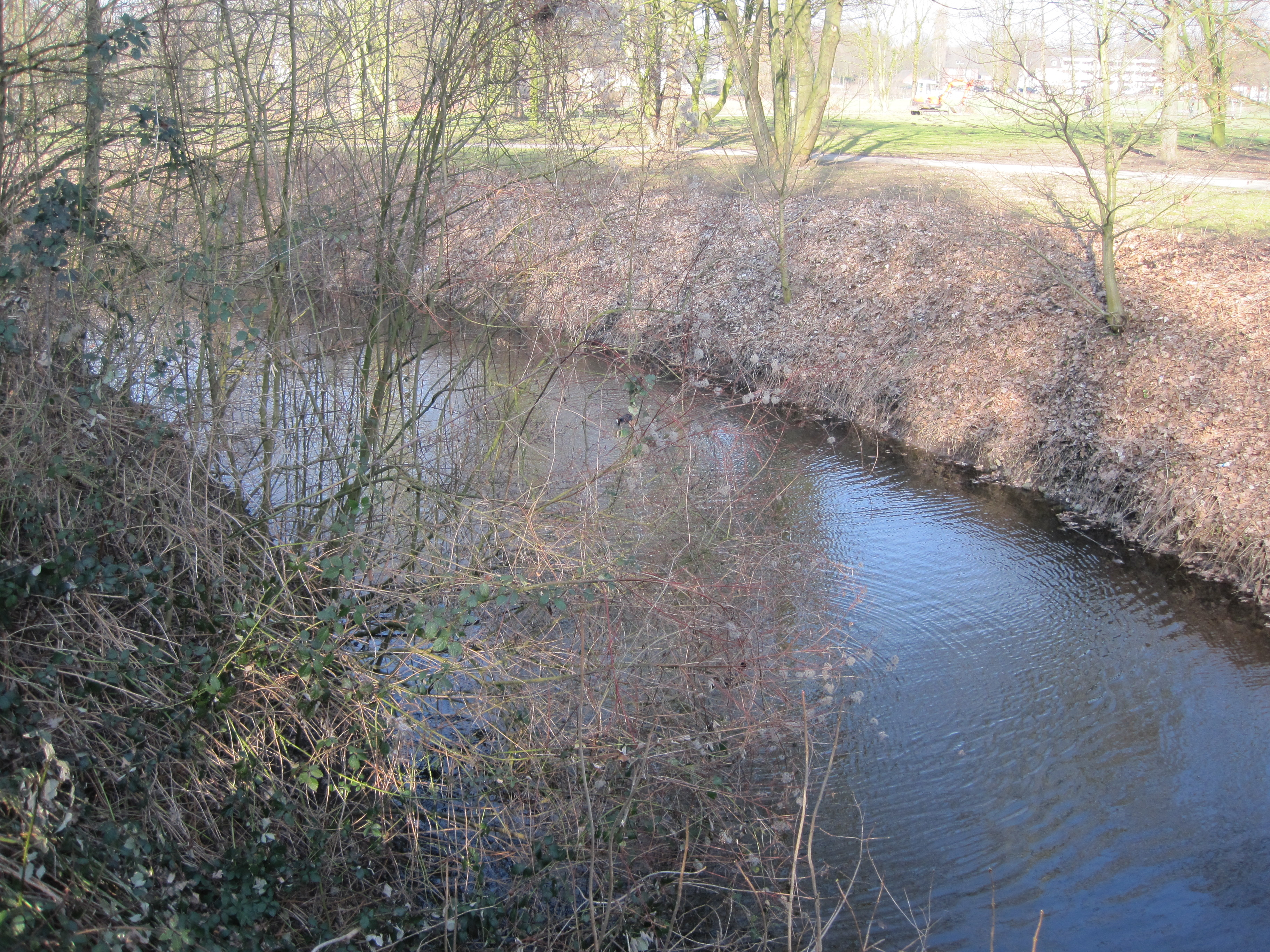 Das Foto zeigt die Binnengräfte auf Burg Mark in Hamm.